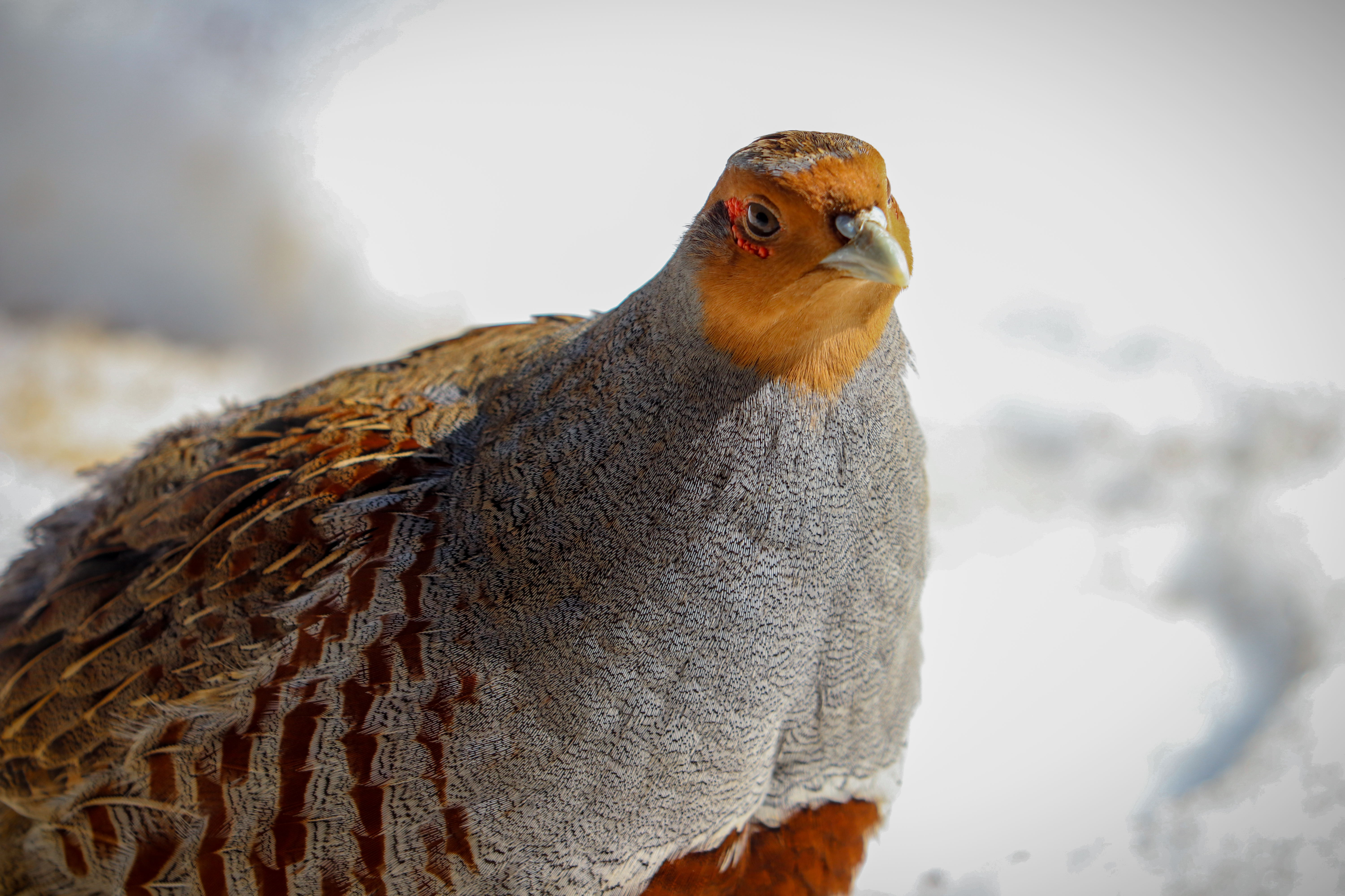 Rebhuhn im Nationalpark Bayerischer Wald